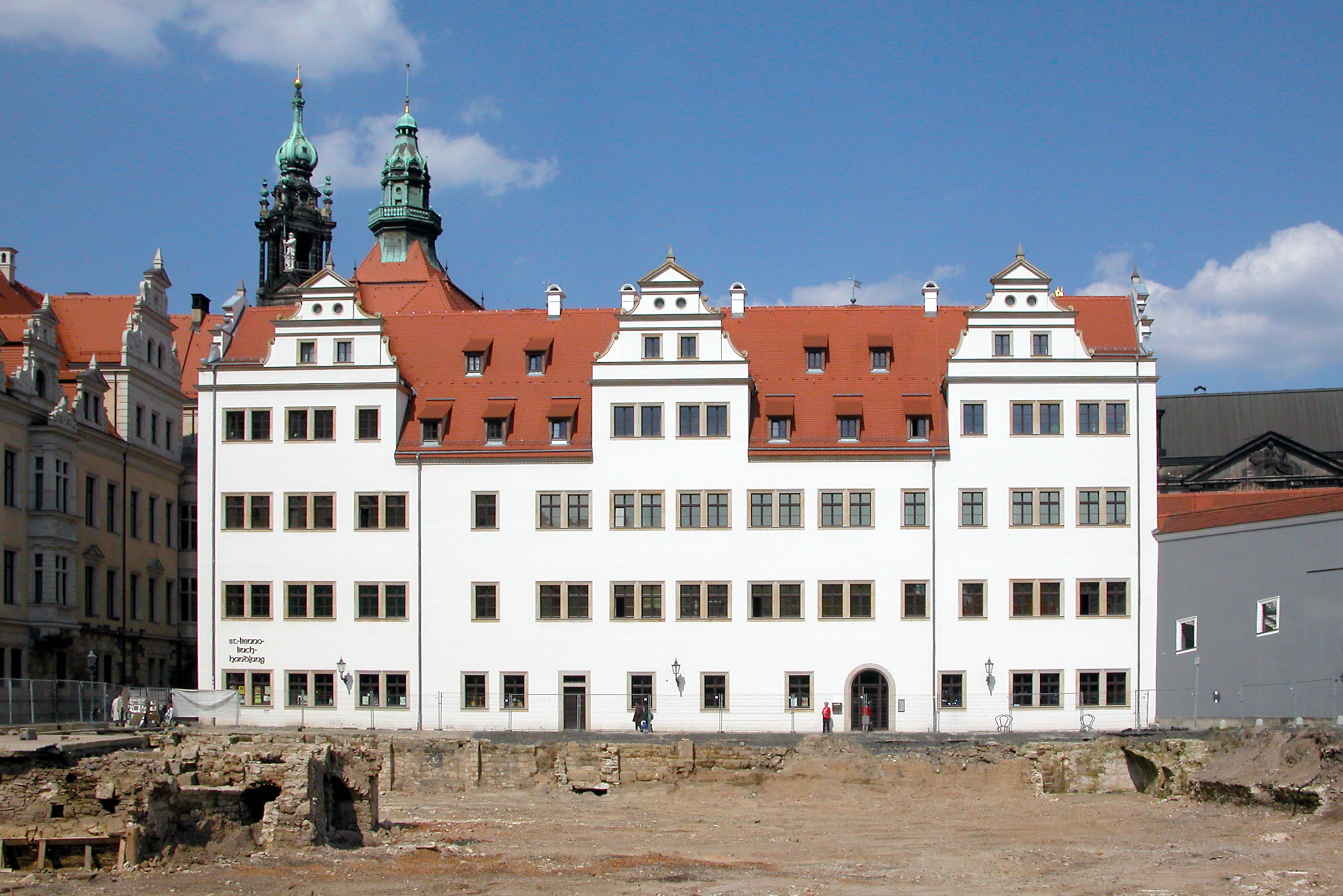 24.04.2008 01067 Dresden-Mitte, Schloßstraße / Kanzleigasse: Blick zur Südfassade des Kanzleihauses (GMP: 51.052612,13.738129). Das ursprüngliche Kanzleihaus am Residenzschloß wurde 1665 - 1567 von Hans Irwisch erbaut und 1945 kriegszerstört. Von 1997 bis 1999 wurde das neue, nun 'Haus der Kathedrale' genannte, Gebäude errichtet. Es ist Sitz des Bischofs von Dresden-Meißen und des Domkapitels sowie Gemeindezentrum der Dompfarrei. Diese Sichtbeziehung wird bald verbaut sein. [DSCN32326.TIF]20080424075MDR(c)Blobelt